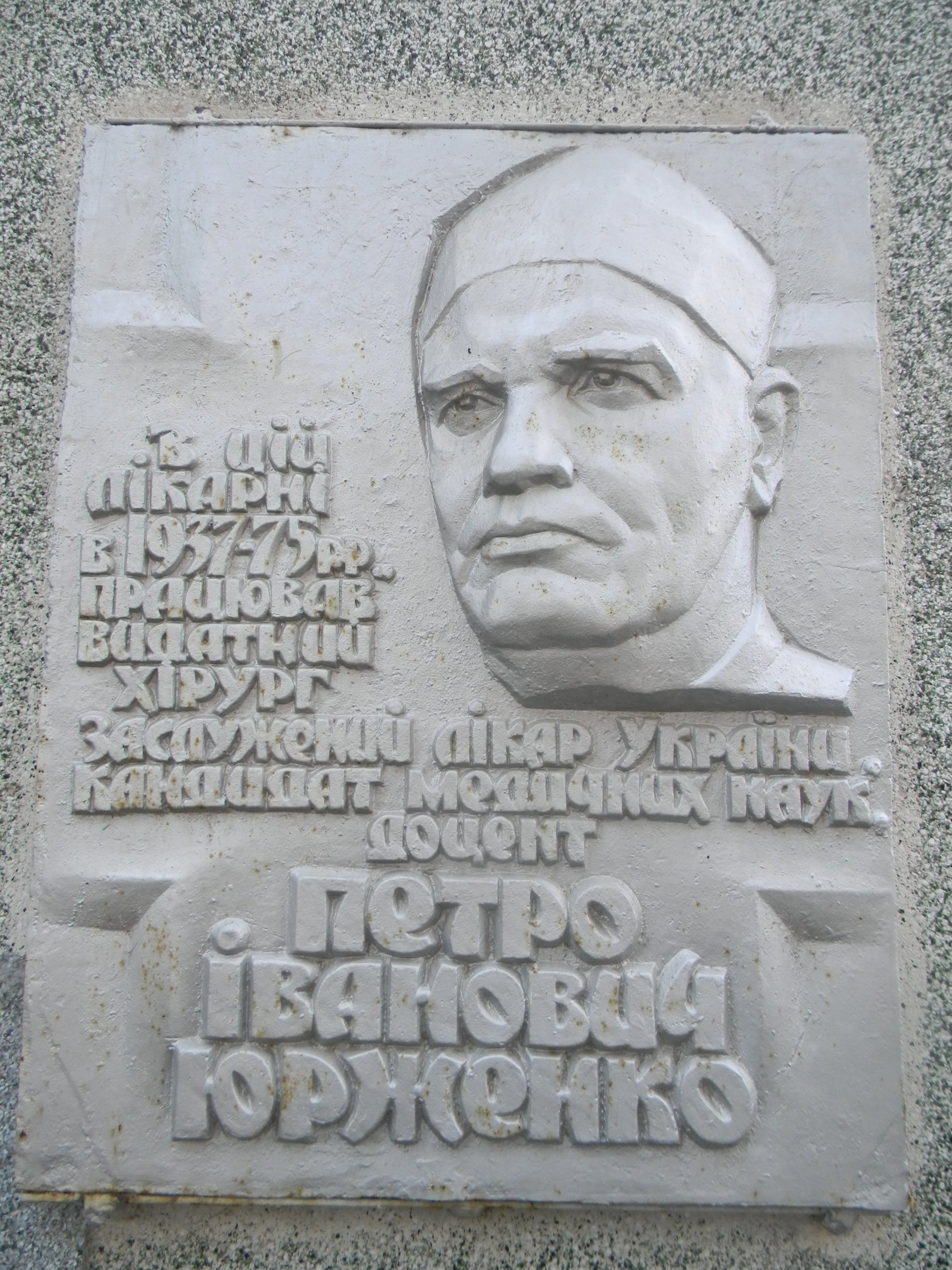 Меморіальна дошка на честь заслуженого лікаря П. І. Юрженка, Херсон, пр-т Ушакова, 67, на будівлі лікарні